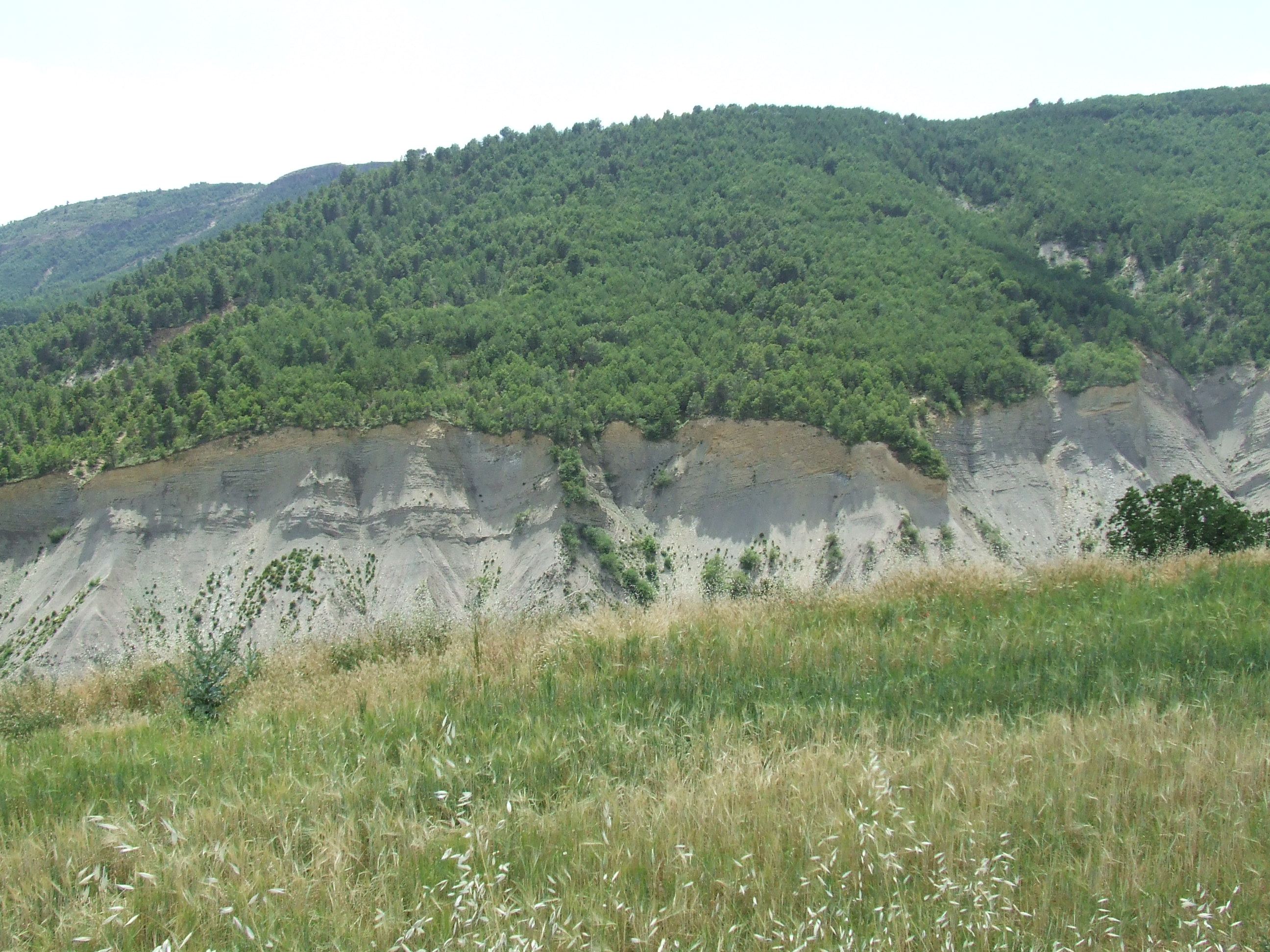 "Els Ensulsiats", al barranc de Fontfreda (Salàs de Pallars, Pallars Jussà)